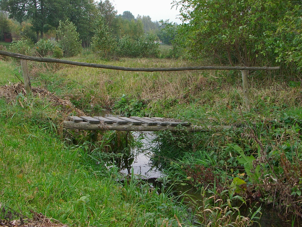 Rzeka Moszczenica w okolicach Głąbia. Moszczenica River near Głąbie. author: Bogdan Janus, Łódź, Poland